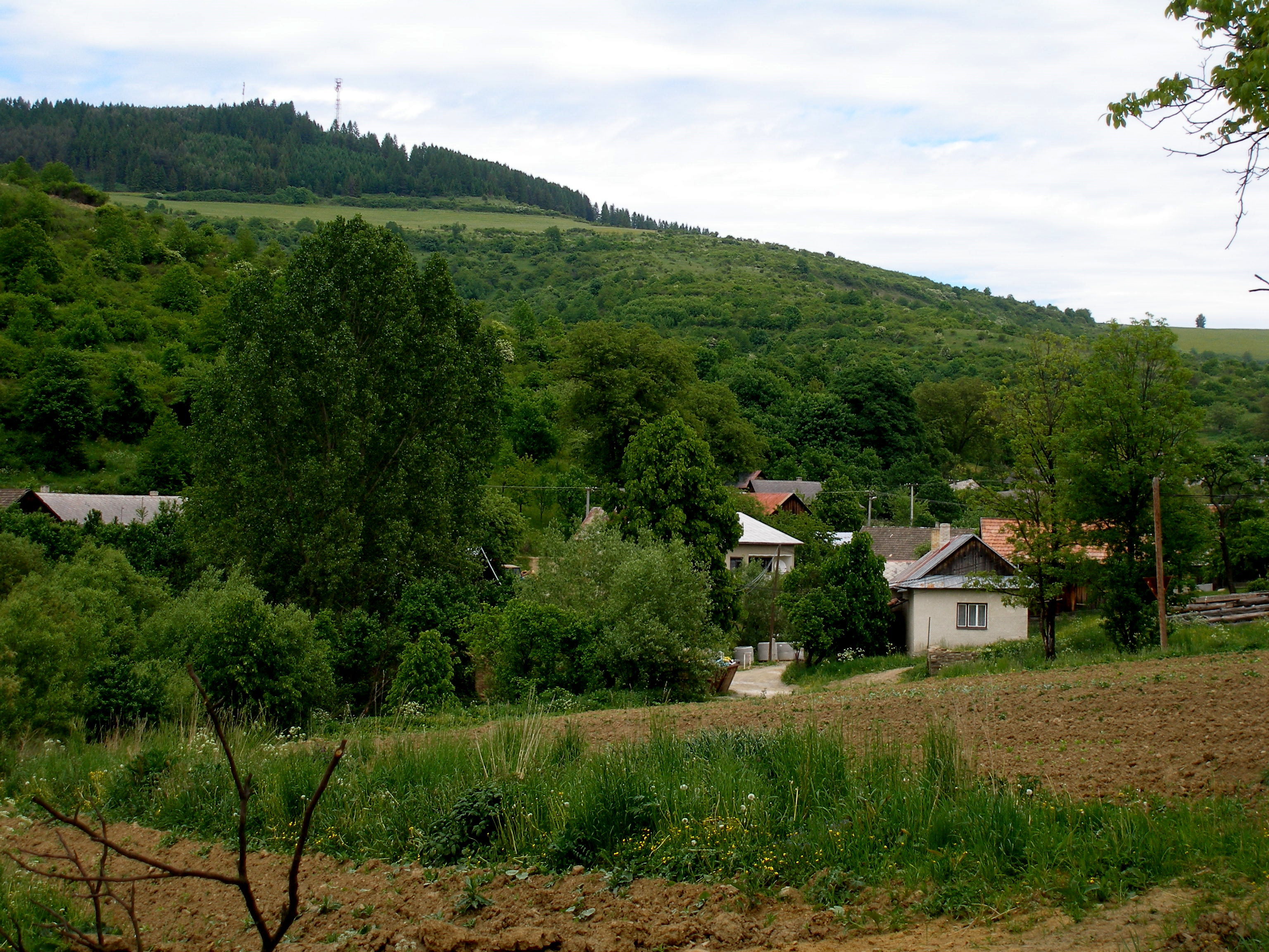 Obec Vysoká okres Sabinov